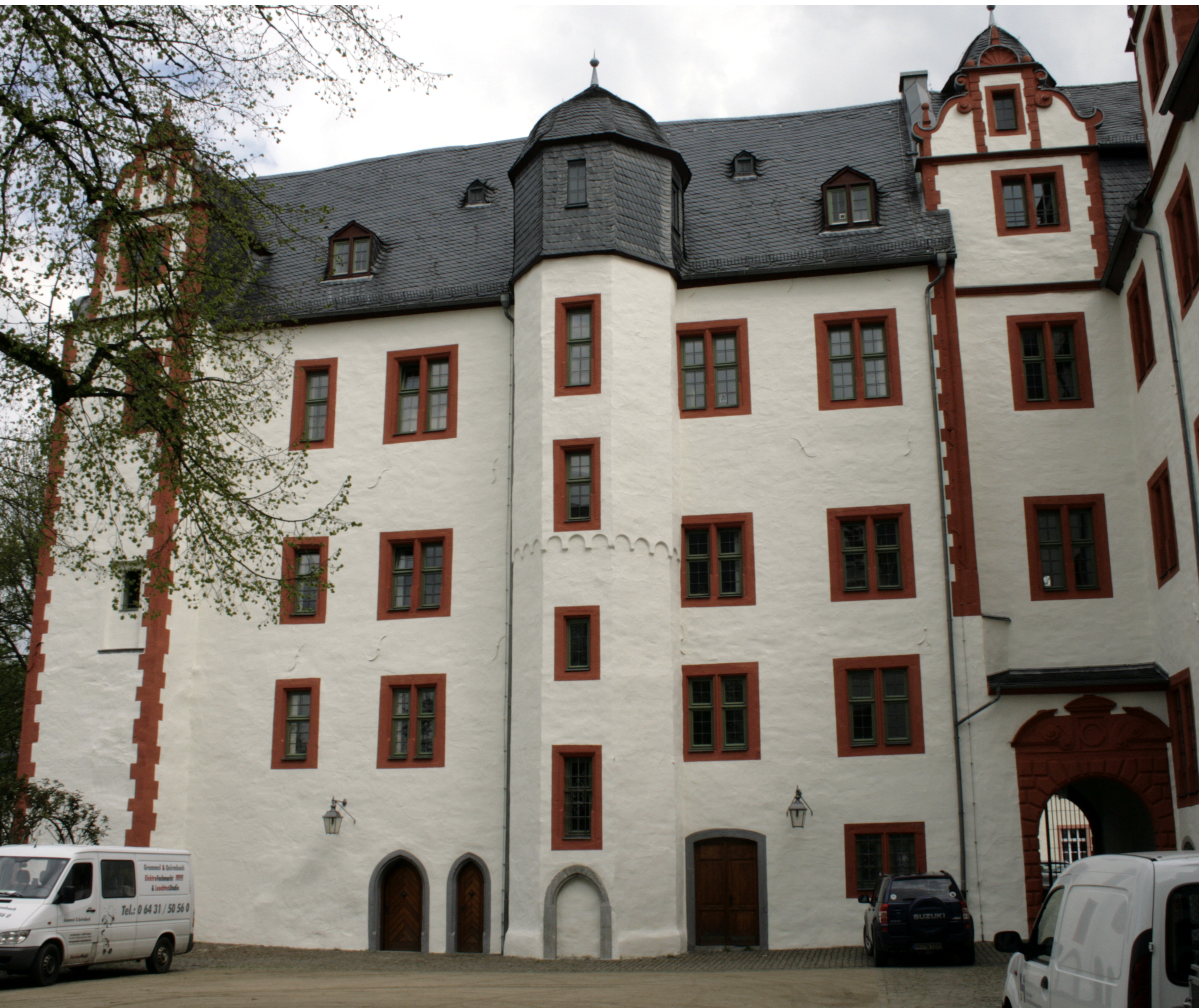 Schloss Hadamar, Nordflügel vom Innenhof aus gesehen, Deutschland